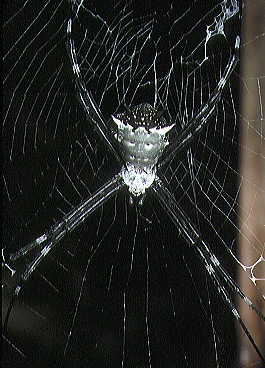 Argiope savignyi from Costa Rica.